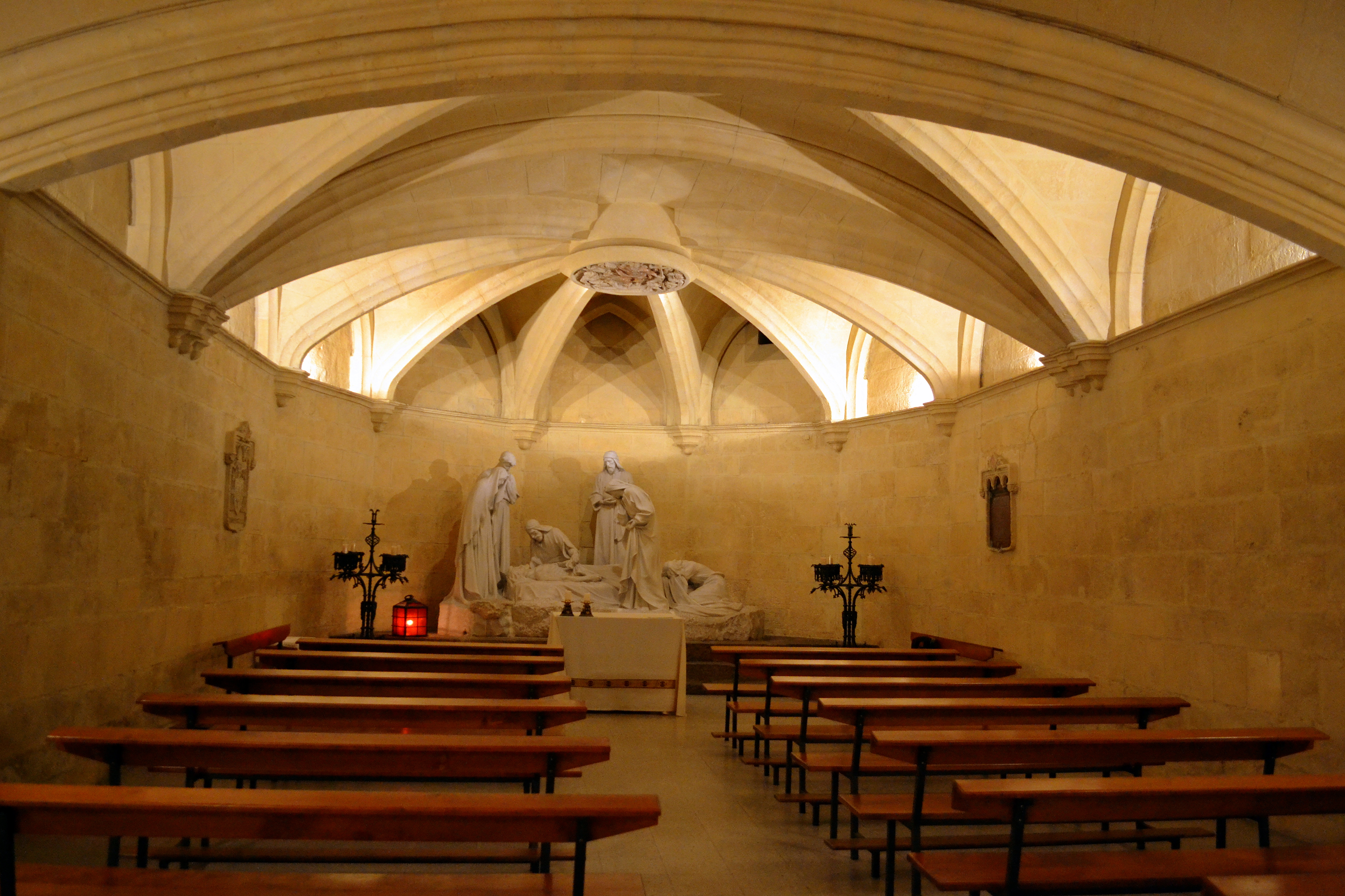 Basílica de Santa Maria (Vilafranca del Penedès)